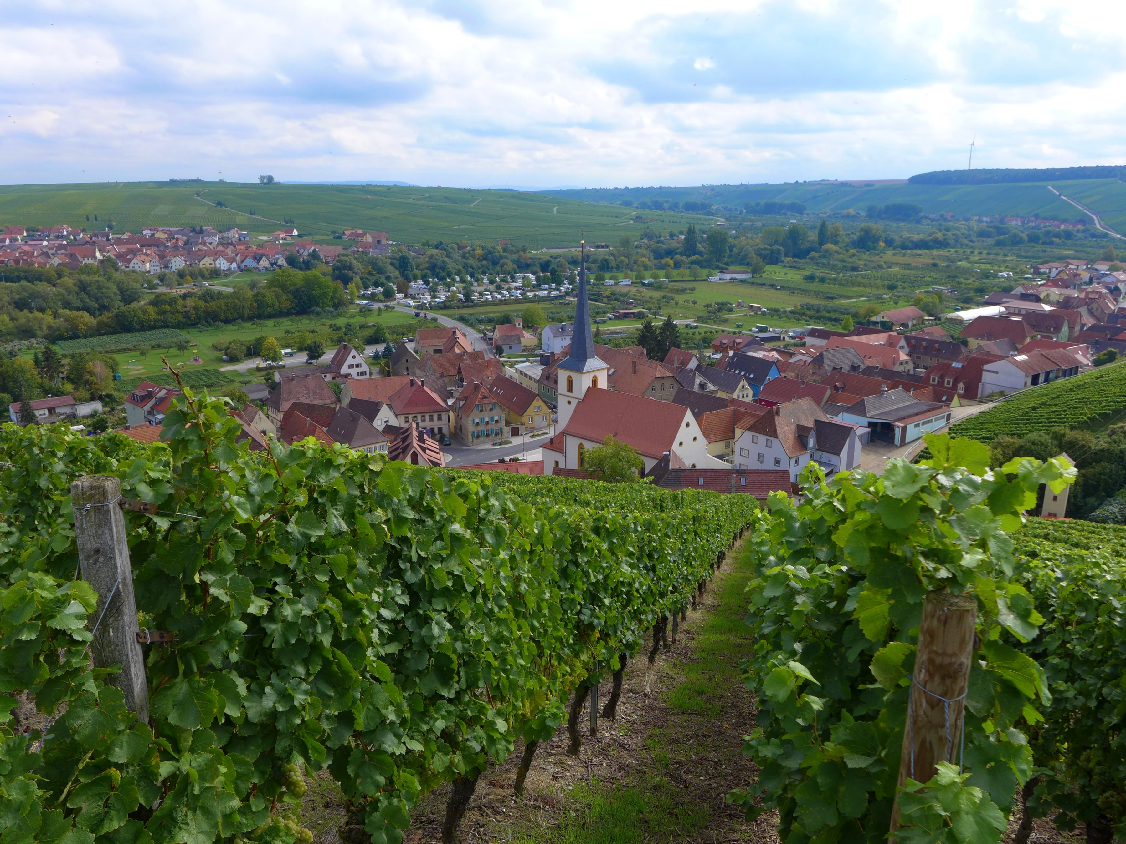 Escherndorf von der Weinlage "Lump" aus gesehen